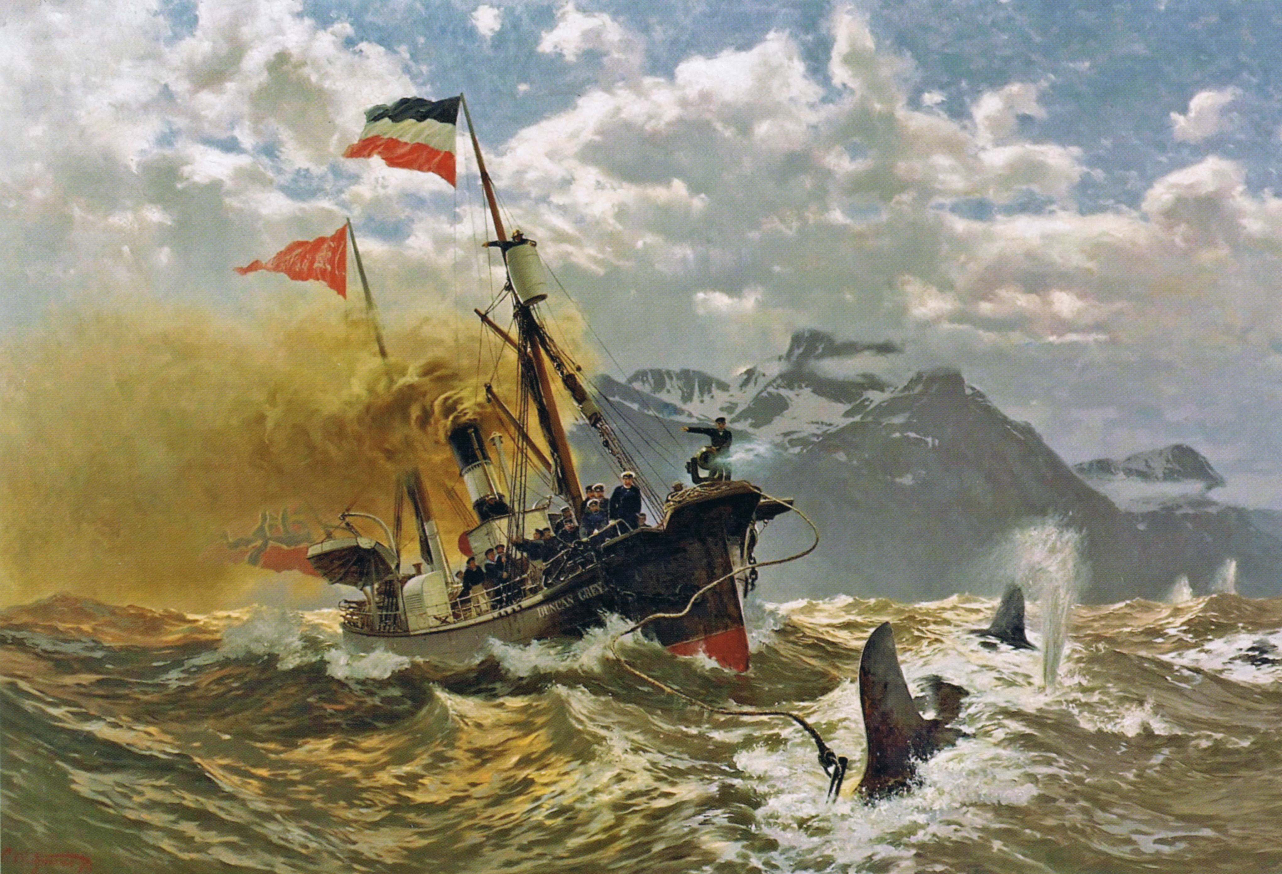 Kaiser Willhelm II auf Waljagd auf dem Walfänger "Duncan Grey", Gemälde von Carl Caltzmann